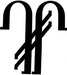 Առաջարկ Գ.Բաբախանյանցի